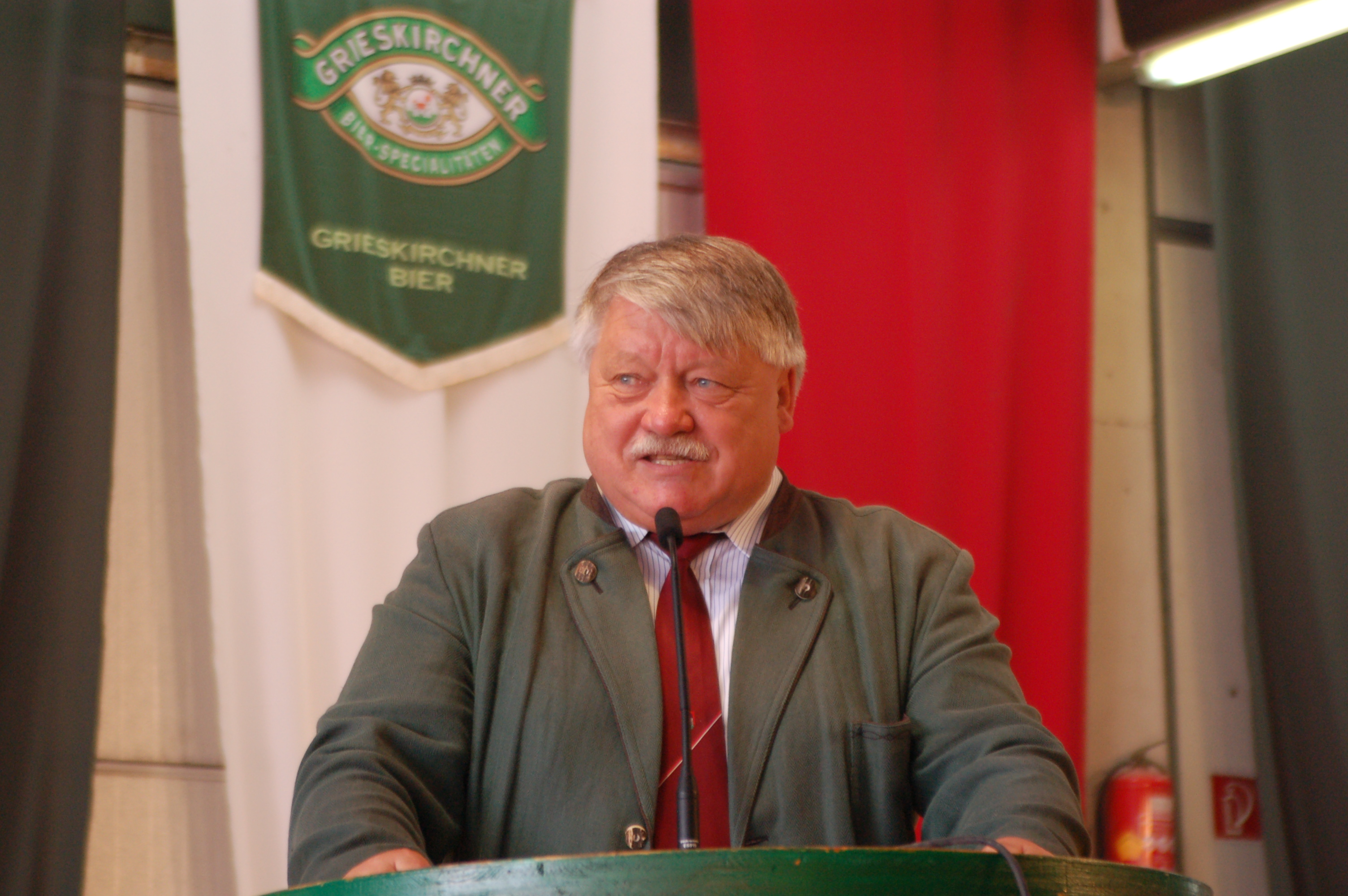 Wolfgang Großruck, Abgeordneter zum Nationalrat und Bürgermeister von Grieskirchen (ÖVP). Aufgenommen bei einer Rede zum 300-jährigen Jubiläum der Brauerei Grieskirchen